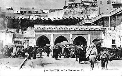 La Douane (début du 20e siècle) et en arrière plan les fortifications et les canons